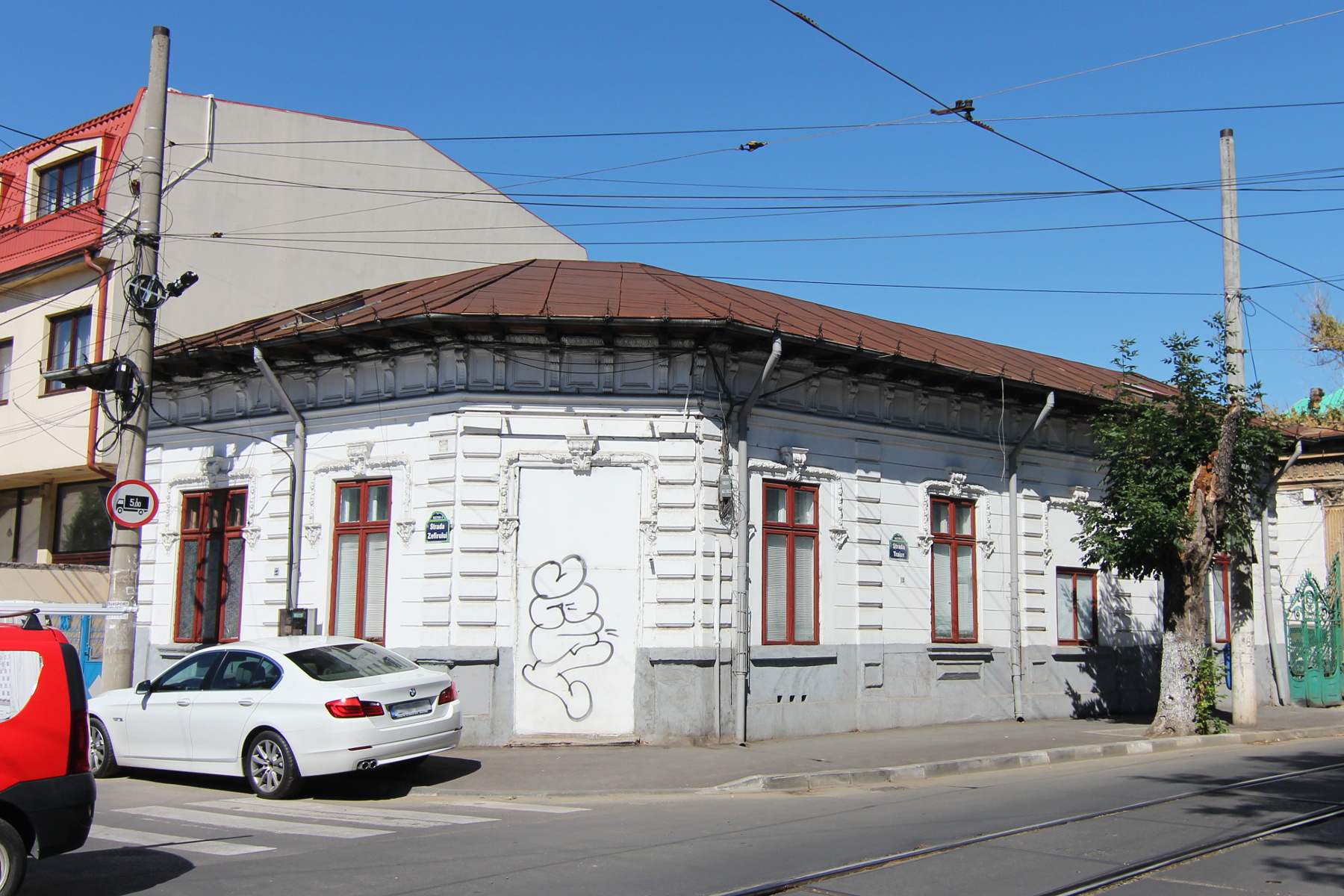 Casă pe strada Traian